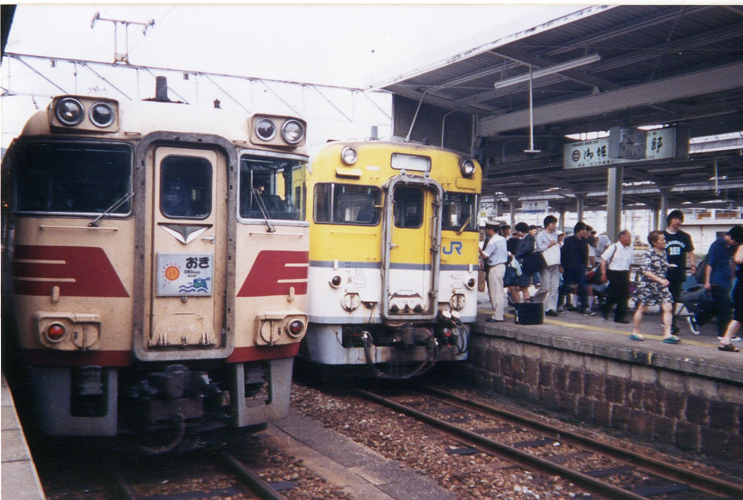 末期のキハ181系おきとキハ23（小郡駅にて）